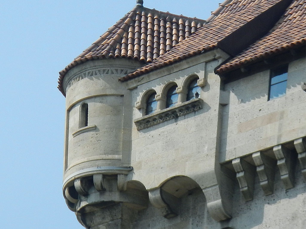 Burg Liechtenstein in Niederösterreich, Maria Enzersdorf im Süden von Wien, angedeutete Maschikulis am Westteil der Burg